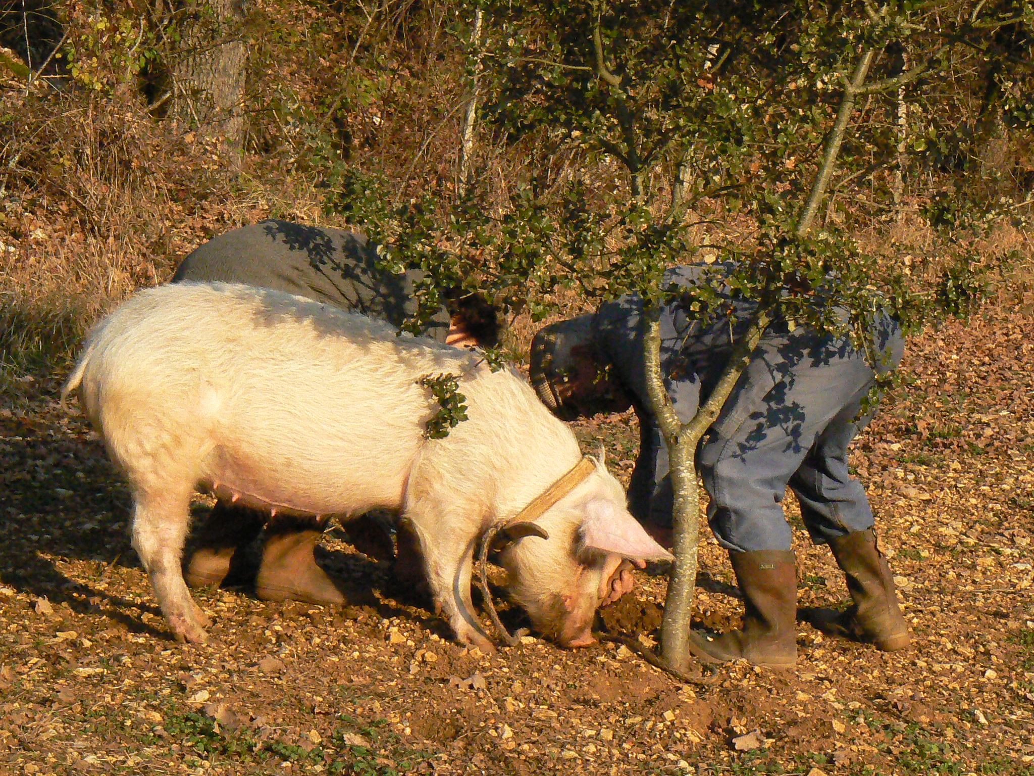 Recherche de truffes à Gignac, dans le Lot, en France